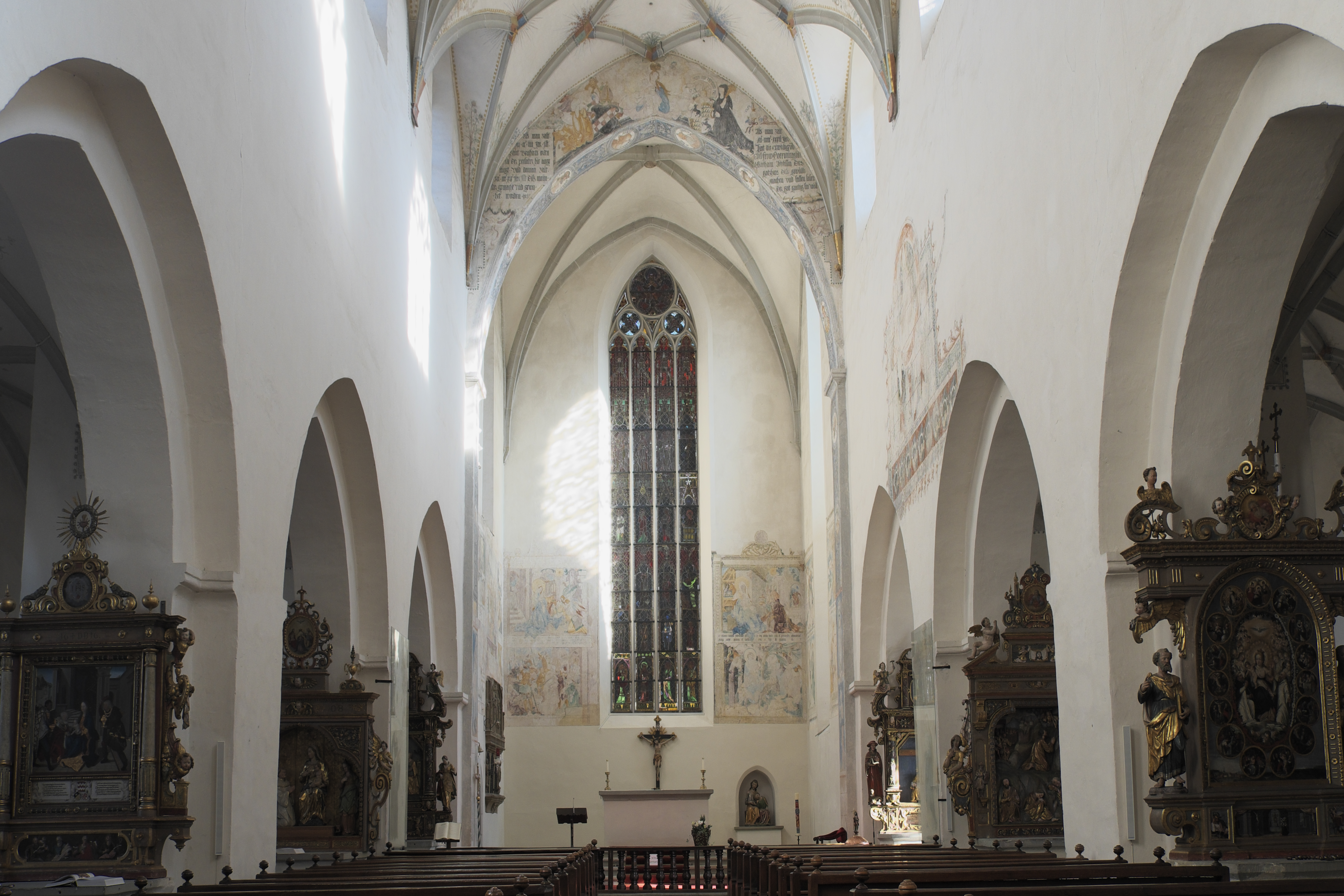 Katholische Pfarrkirche St. Anna, ehemalige Kirche des Zisterzienserinnenklosters in Heiligkreuztal (Altheim) im Landkreis Biberach (Baden-Württemberg/Deutschland), Langhaus